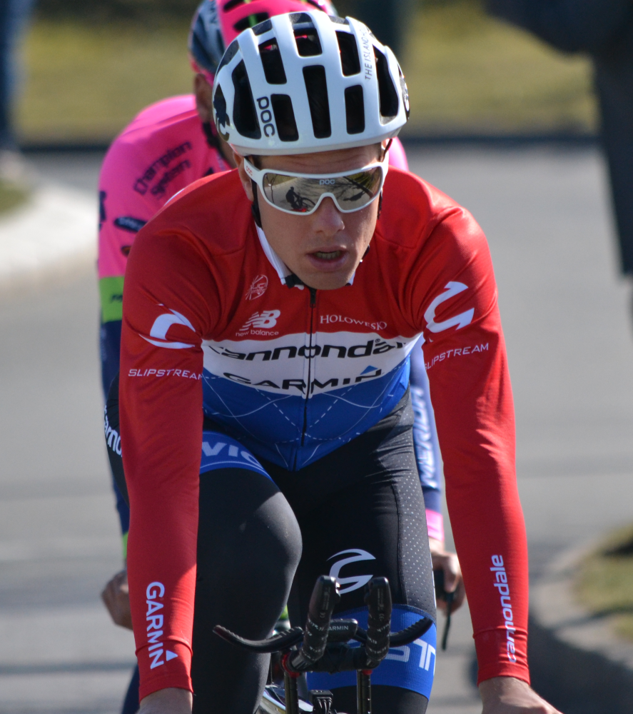 Paris-Nice 2015